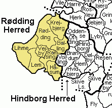 old Viborg Amt, Denmark Source: 'Map by Svend-Erik Christiansen